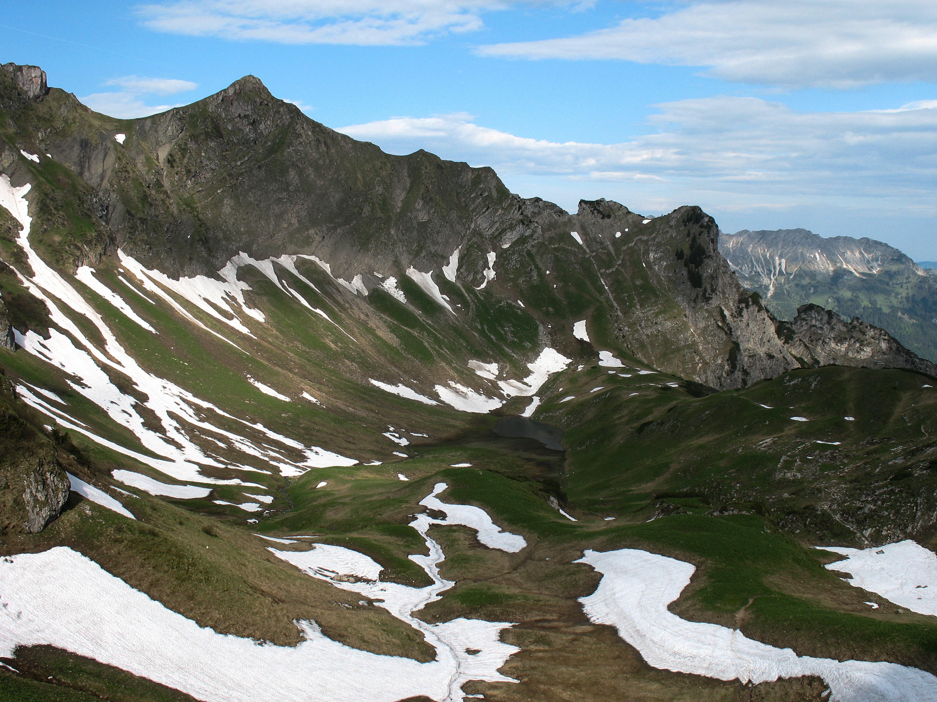 Älpelekopf (2024 m) und Falken (1905 m)